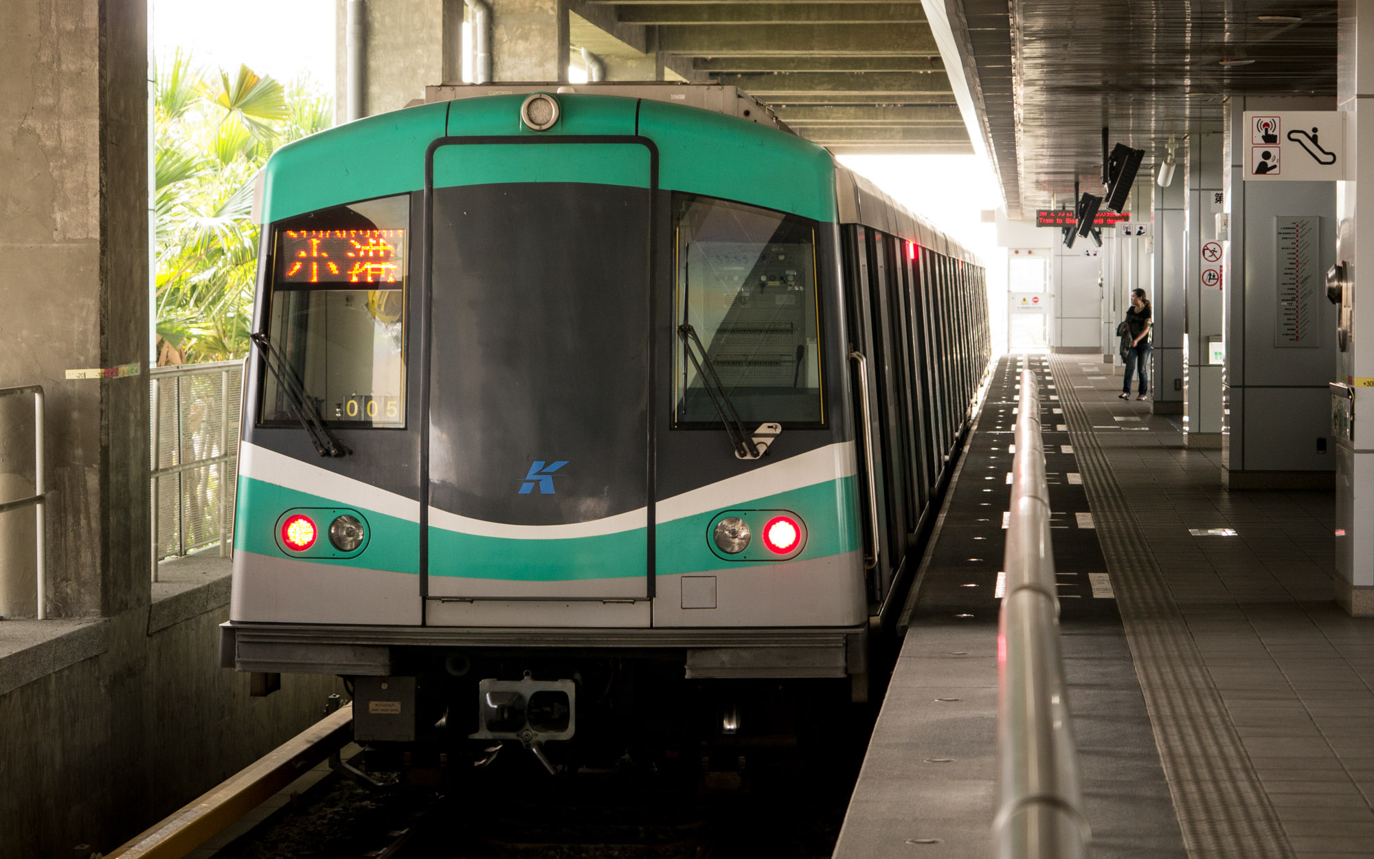 高雄捷運高運量電聯車停靠南岡山站。